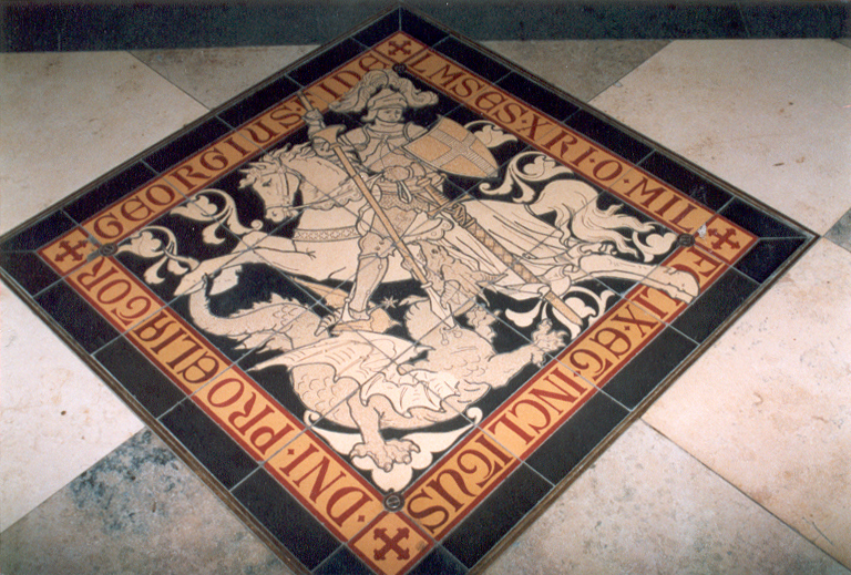 Fotoaufnahme aus der Kirche St. Gudula (1885) in Rhede